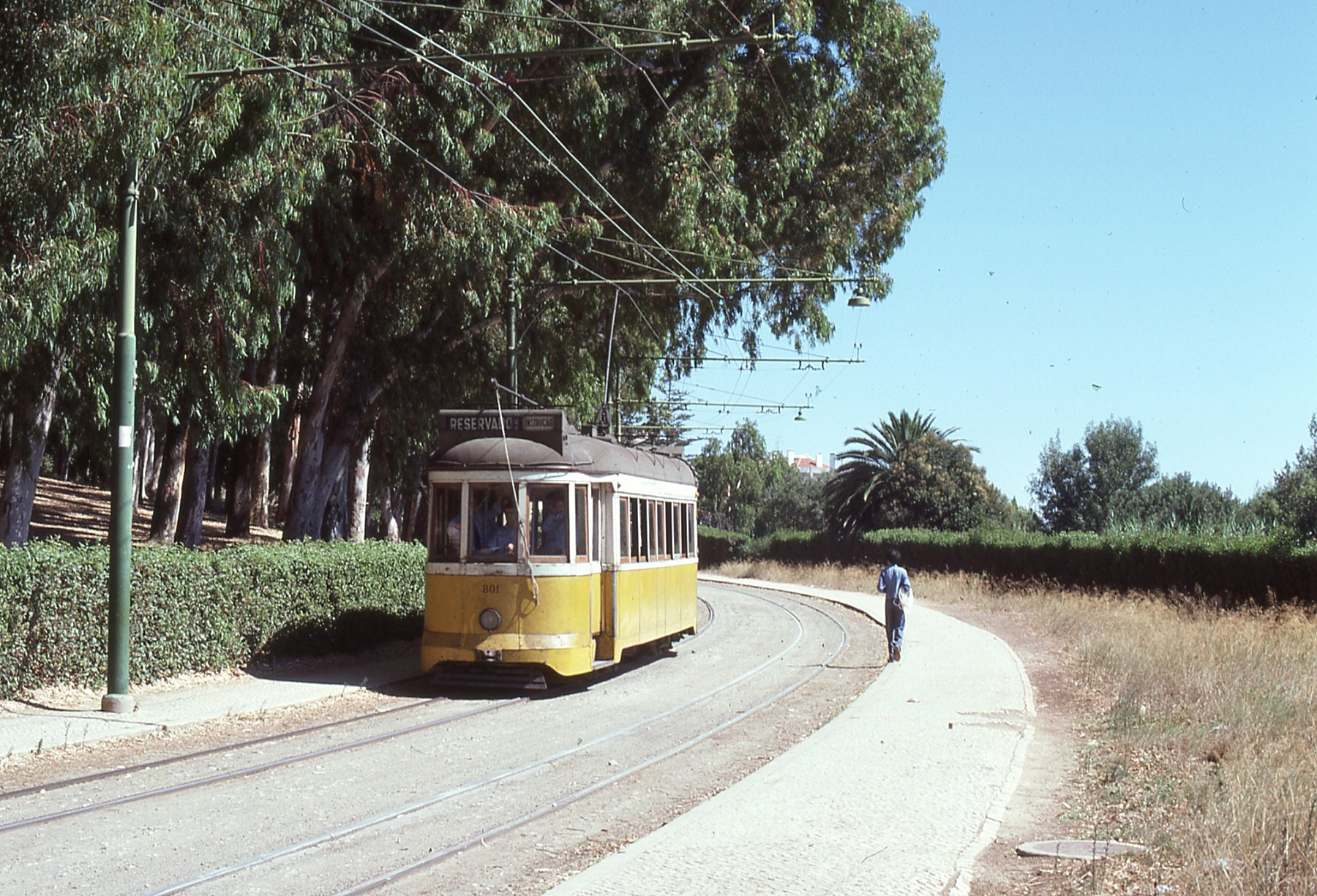 Photo: Trams aux Fils. Prise en 1977 Ligne 15 cette ligne existe encore à ce jour, mais avec des trams modernes, et la ligne ne va plus à ESTADIO. Estadio (terminus de la ligne en 1977) Tram 801 de la série 801-810, il n'existe plus, il reste le 802 au musée des Trams de Lisbonne et le 807 qui est parti pour Saragosse (Espagne) collection privée.